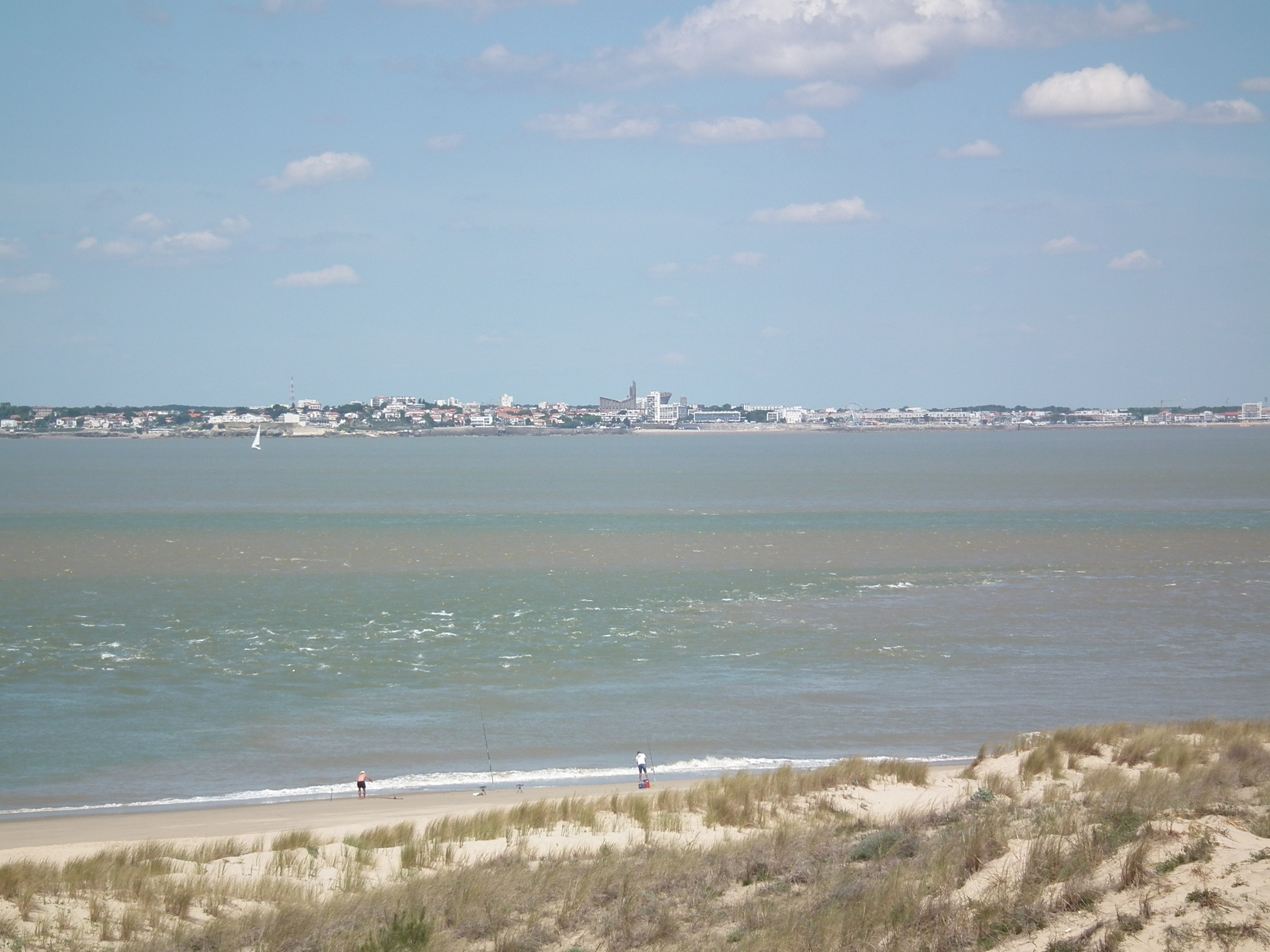 Vue de Royan depuis la pointe de Grave